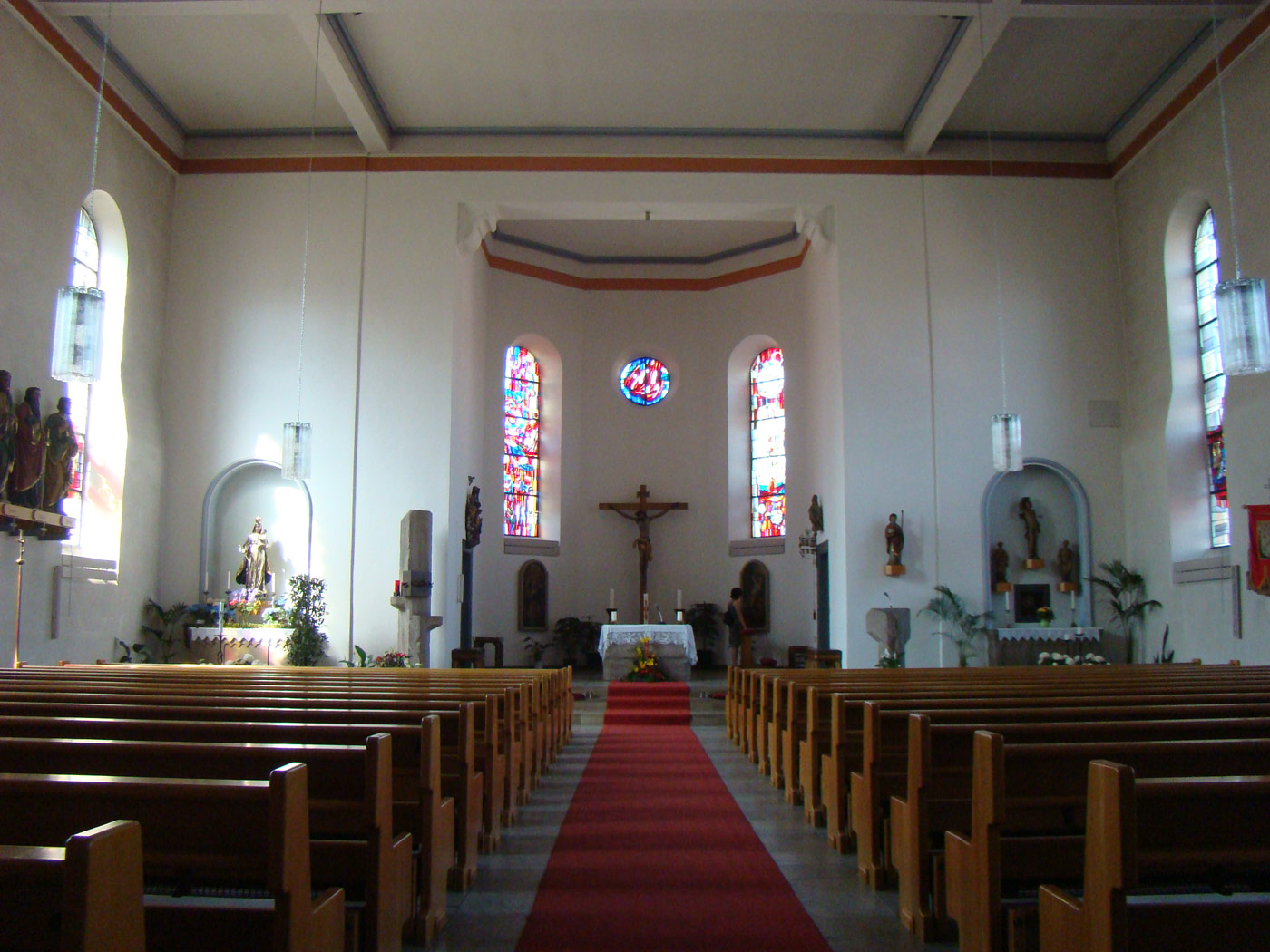 Kath. Kirche St. Alban in Heilbronn-Kirchhausen, Blick zum Chor